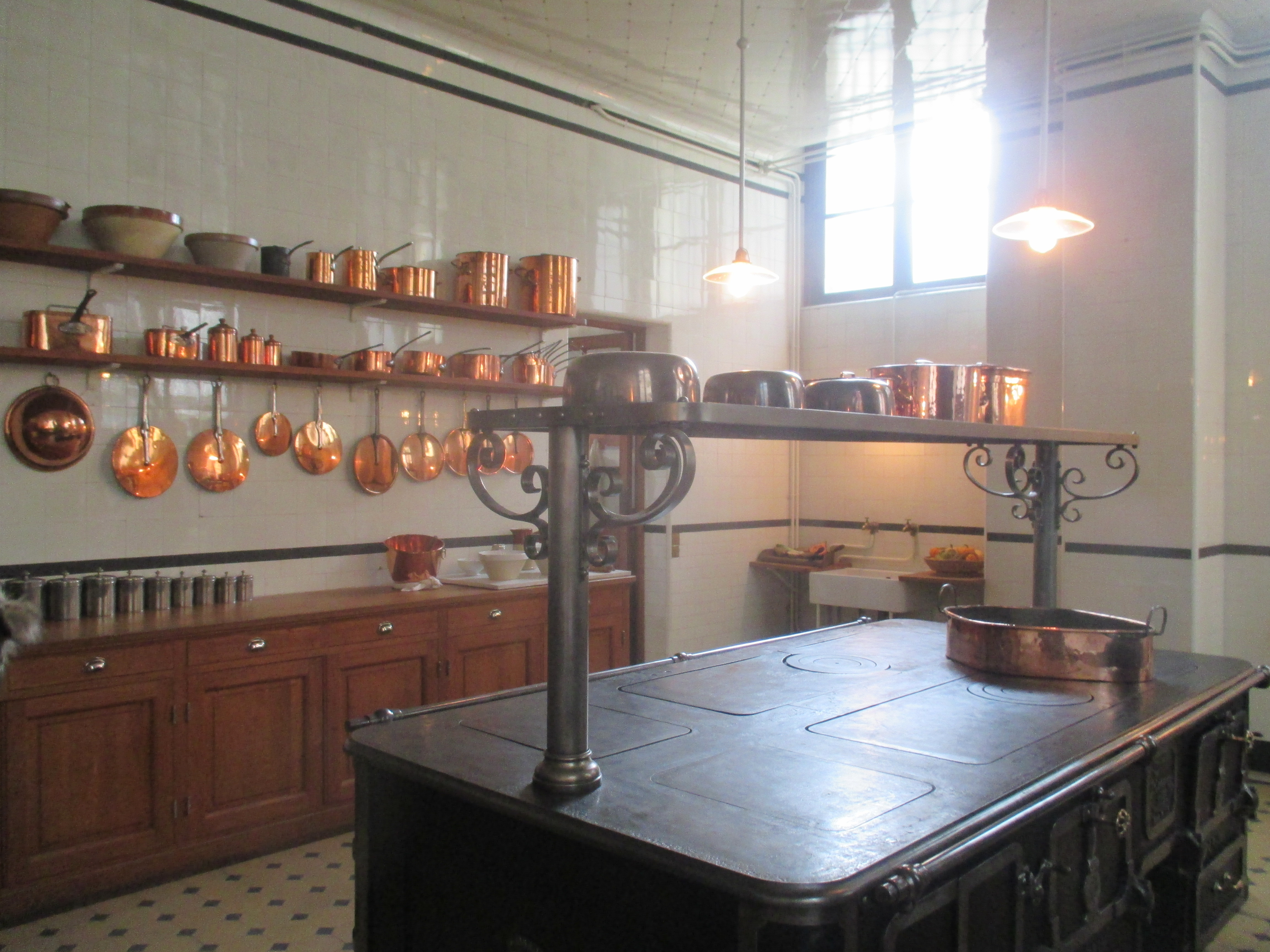 Cuisine de l'hôtel particulier Camondo à Paris VIIIe.